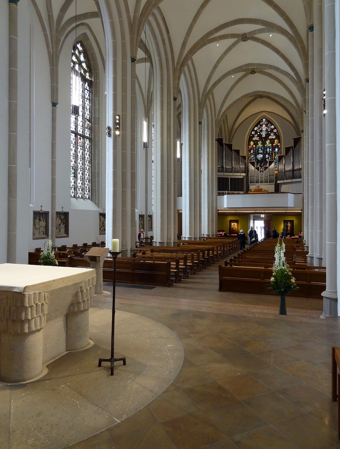 Propsteikirche St.Johann in Bremen - Innenansicht Richtung Westen nach der Renovierung von 2016.